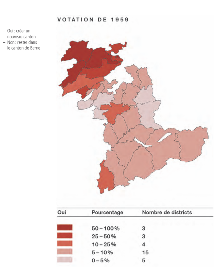 Résultat de l'initiative cantonale du 5 juillet 1959 sur la création d'un canton du Jura.